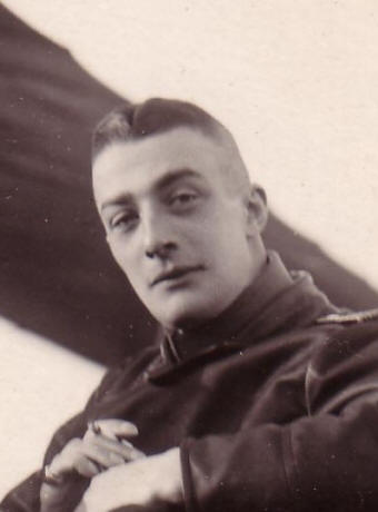 Albatros - Werke in Johannisthal im Jahr 1913 Flugschüler Karl-Albrecht Mensching im Cockpit